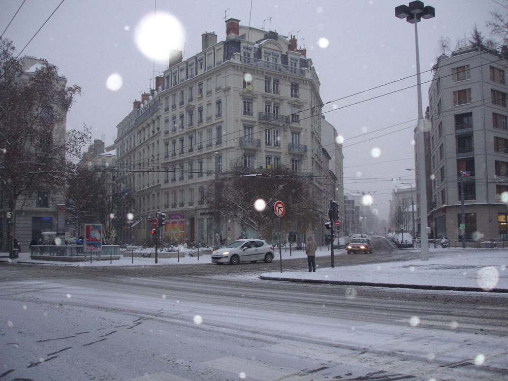 rue Elie Rochette à Lyon (Rhône, France).